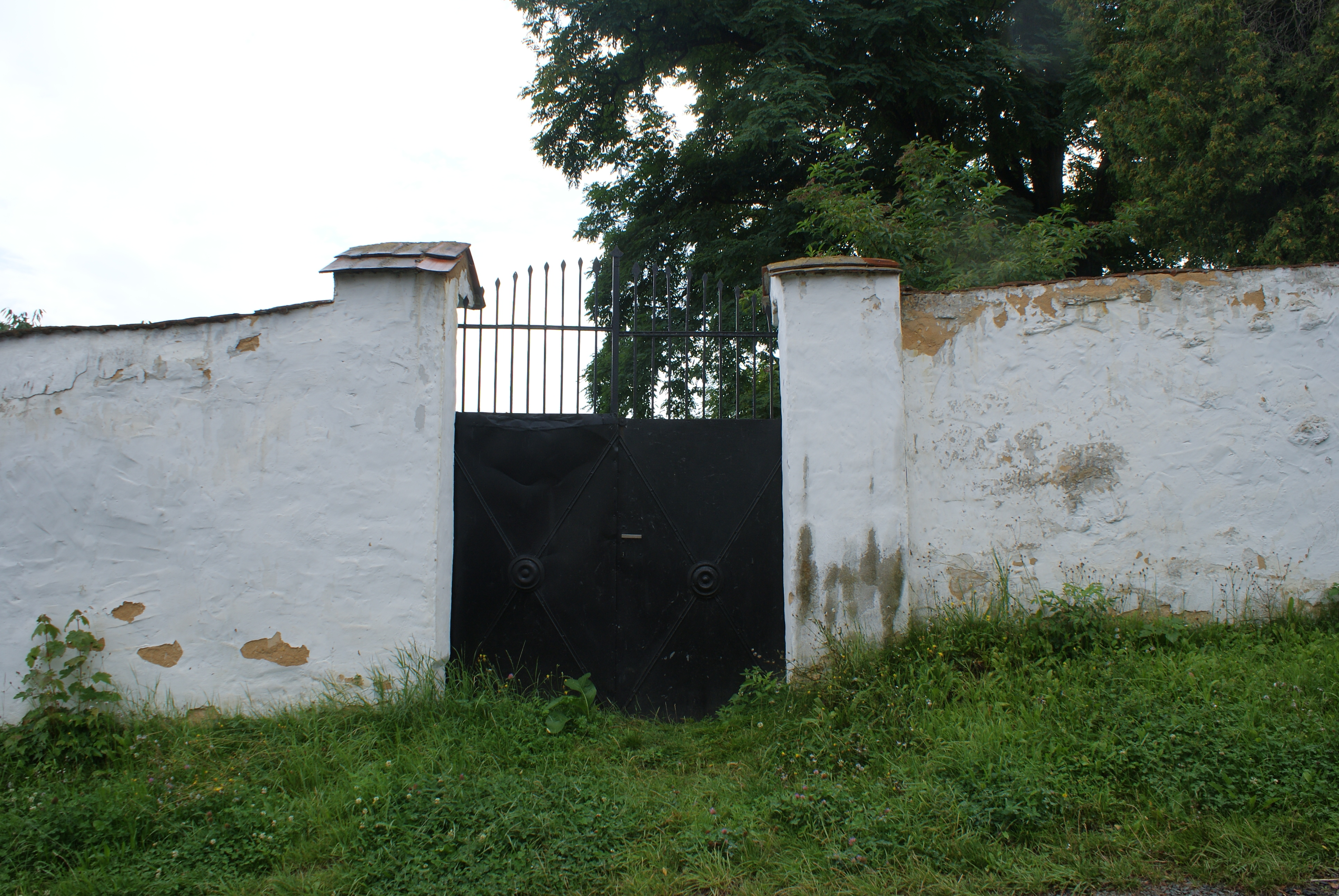 Spálené Poříčí, a town in Plzeň-South District, Czech Rep., Jewish cemetery SONY DSC